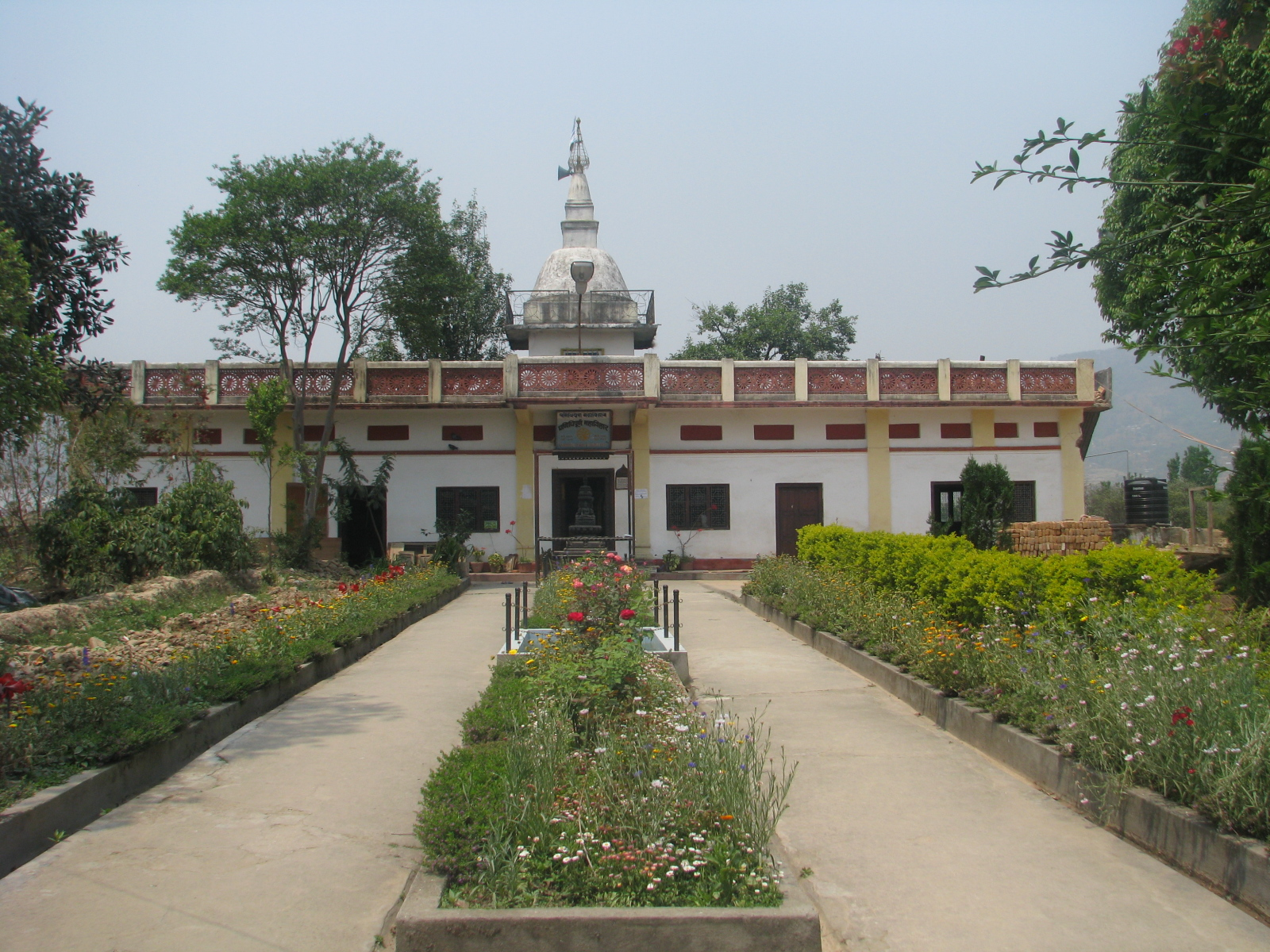 बलम्बुया बिहारया किपा